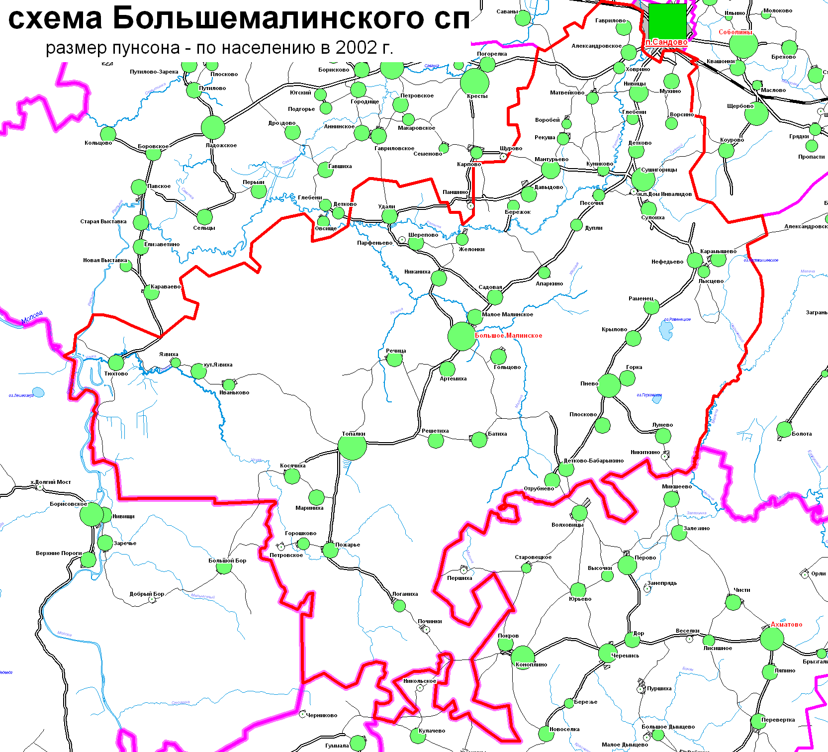 Схеме Большемалинского сп